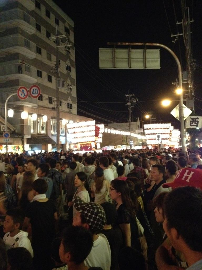 神社前の通り